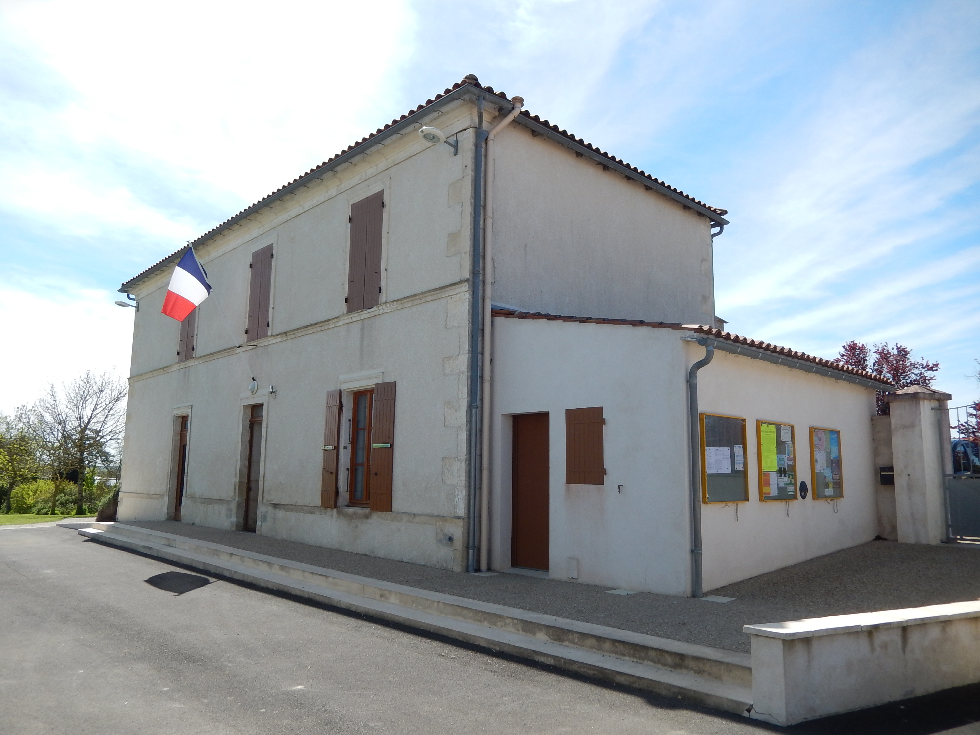 La mairie de Chervettes.